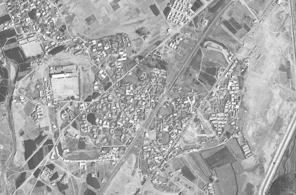 경상남도 마산시 합성동 및 합포성지 일대. 국토지리정보원 보관자료